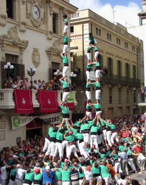 Primera Torre de 8 amb folre i Pilar de 7 amb folre descarregats de la història, Castellers de Vilafranca